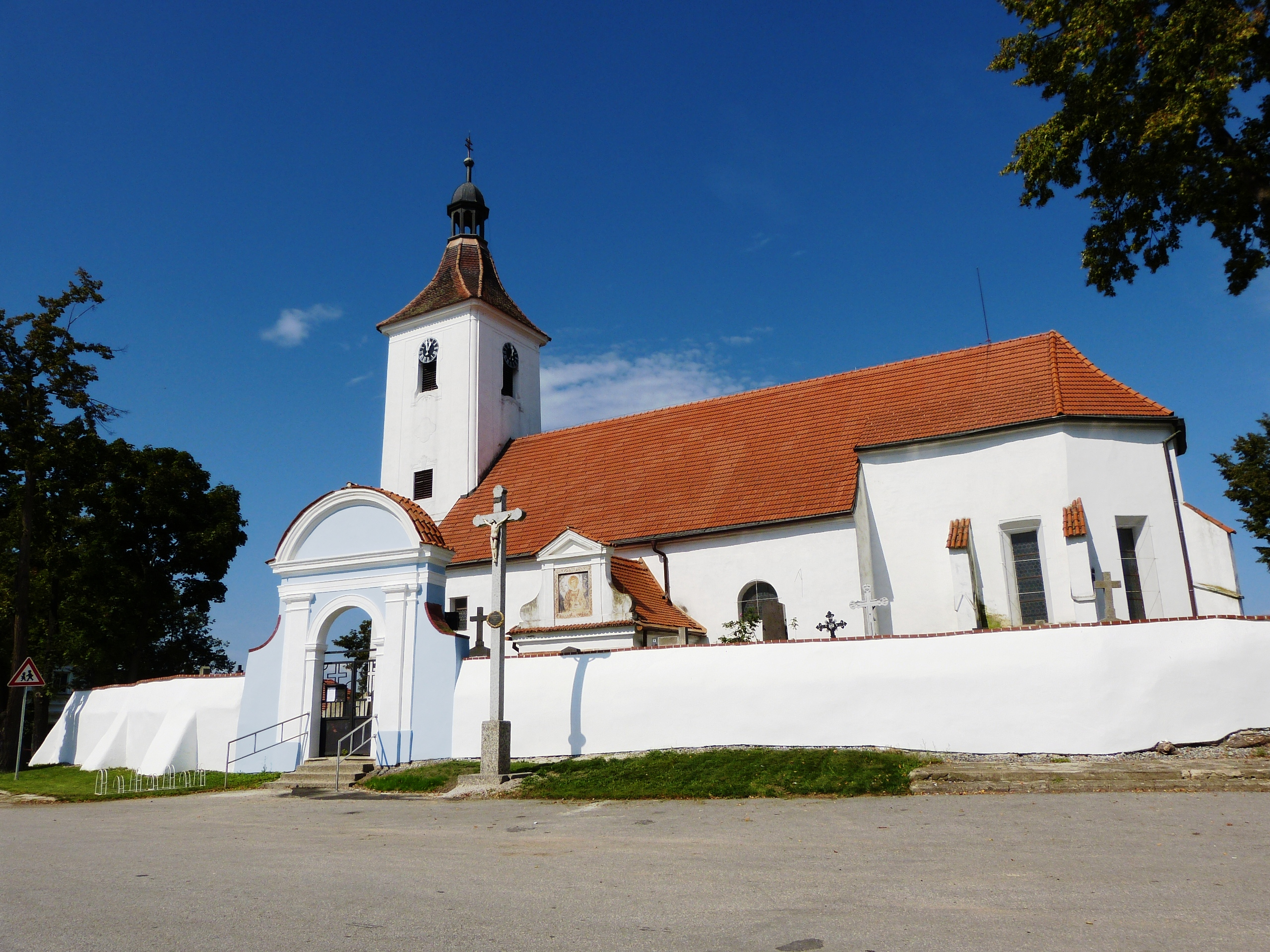 Kostel svatého Vavřince, Pištín.